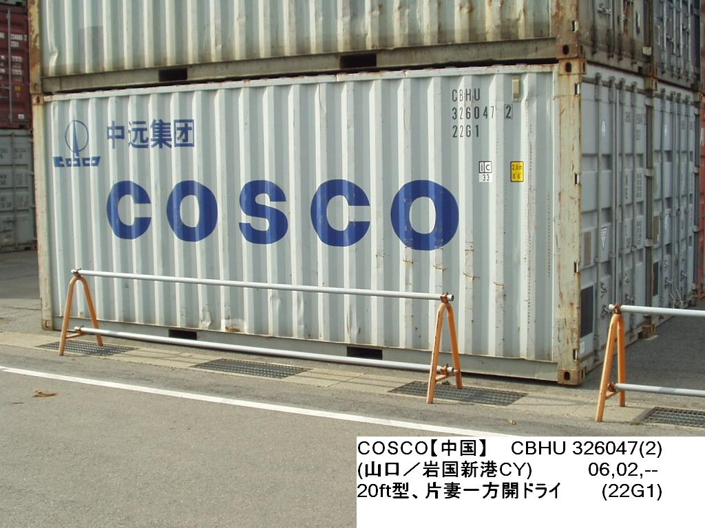 山口県／岩国新港コンテナヤード。